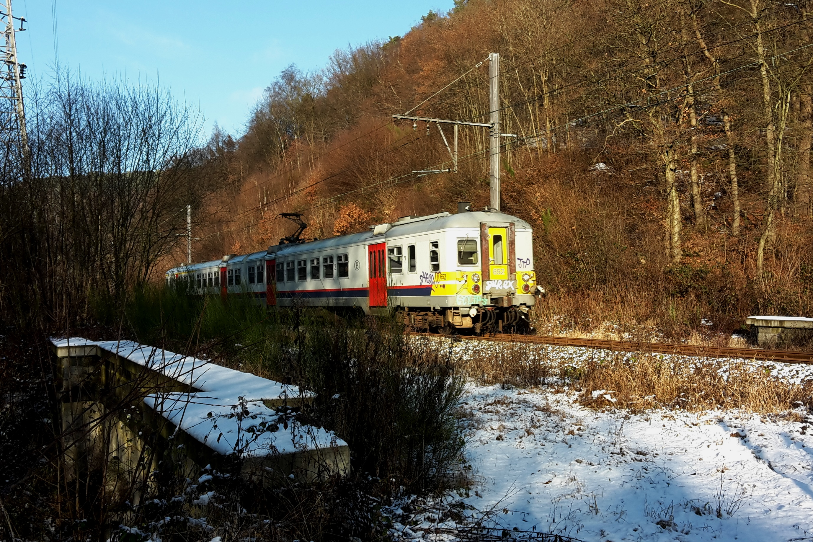 SNCB-Triebwagen Nr. 652 als Zug 5034 von Aachen nach Spa-Géronstère passiert am 3. Januar 2017 die einstmals zweigleisige Brücke über den Chawion-Bach. Etwa 500 m nördlich befand sich früher die Bahnhaltestelle La Reid und auch heute noch die Bushaltestelle «La Reid Gare» des TEC Liège-Verviers.